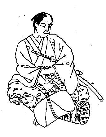 田中河内介